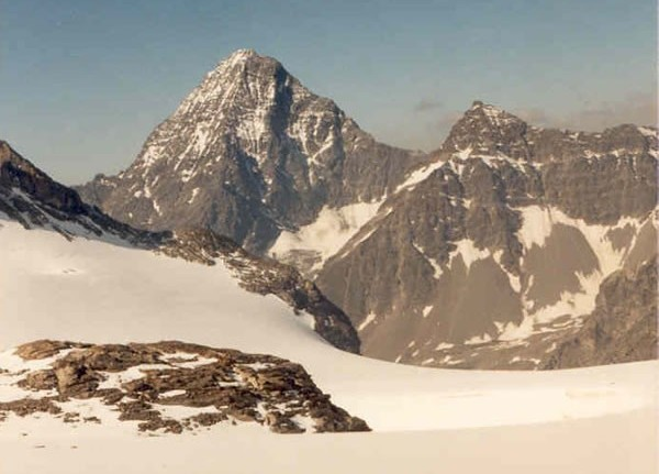 Piz Linard